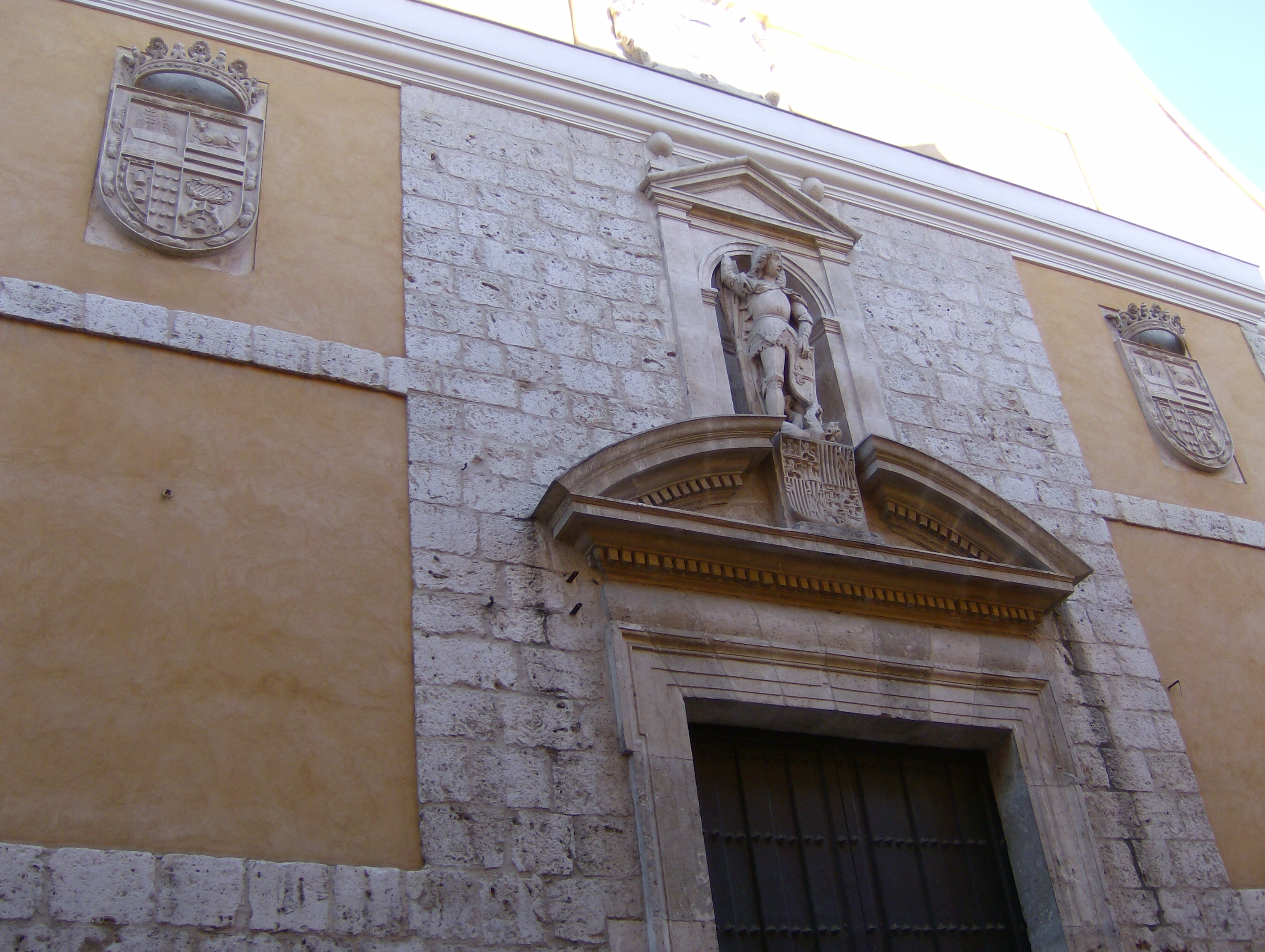 Iglesia de San Miguel y San Julián (Valladolid)